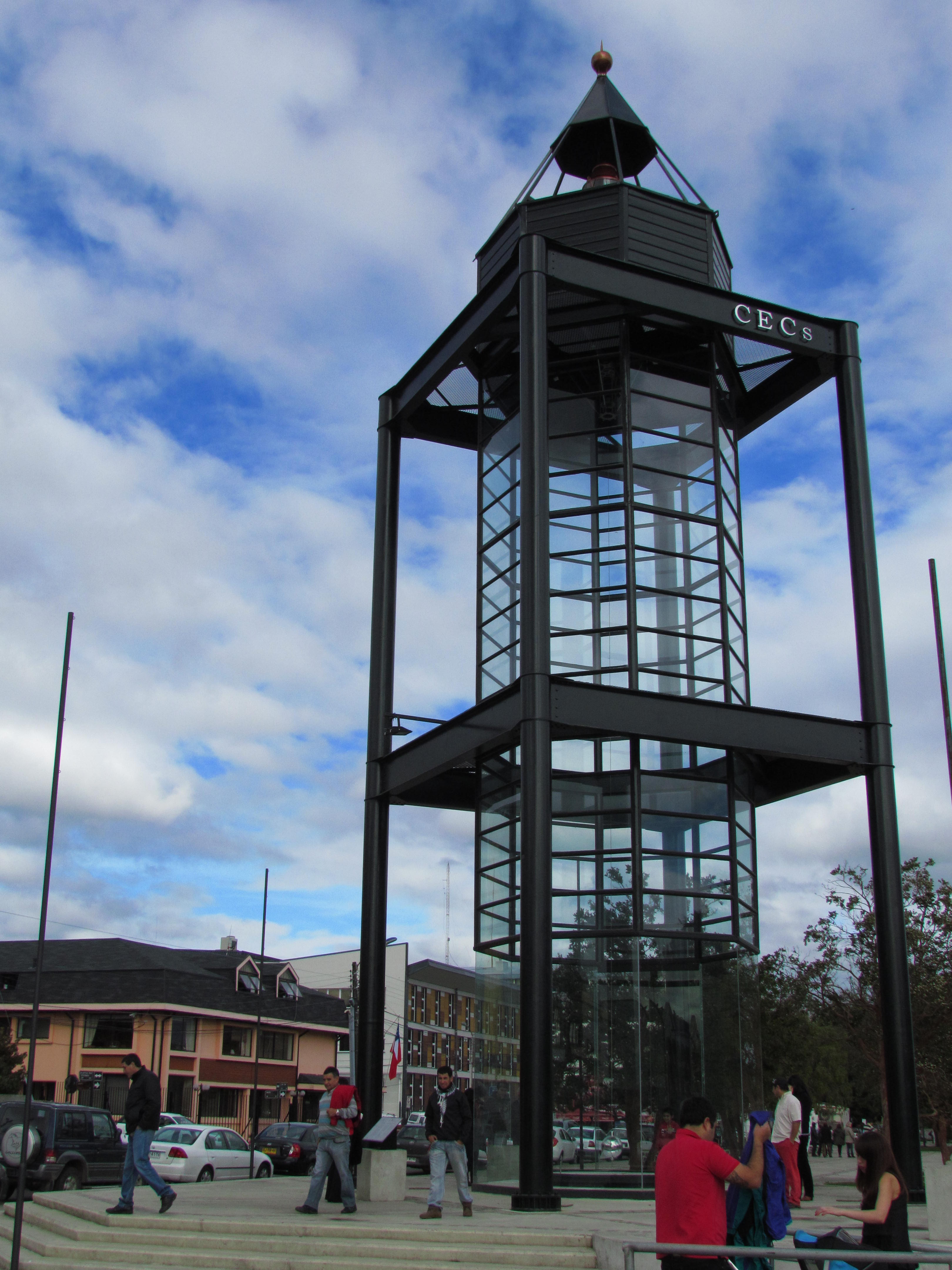 Péndulo de Foucault